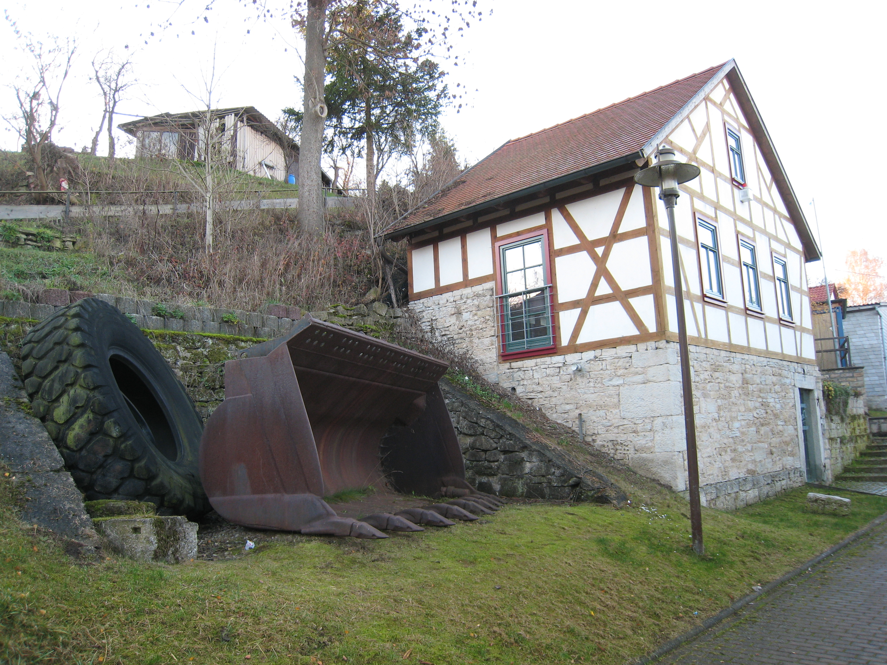 Tunela muzeo en Niederwillingen, Unterm Berge 6, Germanio